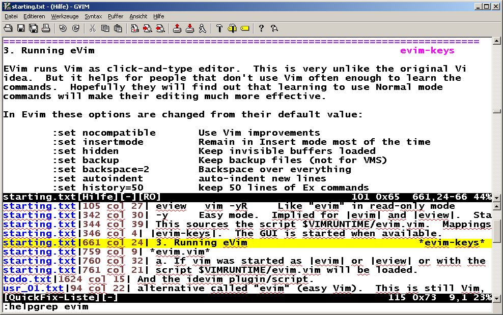 gVim mit zwei Fenstern, die die Verwendung des Quickfix-Modus zeigen. Dieser Modus ist eigentlich für die Programmierung und dort die Fehlersuche gedacht und wird hier für das Durchsuchen der Hilfe nach dem Schlüsselwort "evim" mit dem Befehl ":helpgrep evim" verwendet. Unten die Quickfix-Trefferlist, die mit ":cwindow" angezeigt werden kann. Mit auf einen Eintrag wird oben die gefundene Stelle in einem separaten Fenster angezeigt, hier der Eintrag "3. Running eVim" (gelbe Zeile), der sich in der Hilfe-Datei starting.txt unter dem Schlüsselwort evim-keys befindet.